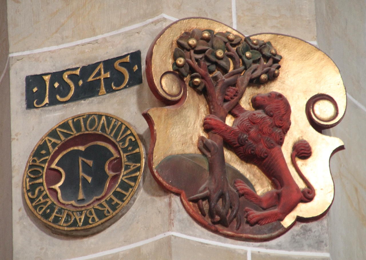 Pirna, Stadtkirche St. Marien: altes Pirnaer Stadtwappen, Jahreszahl 1545 und Wappen von Anton Lauterbach (1502-1569), Theologe und Reformator, erster evangelischer Superintendent in Pirna, in seine Amtszeit fiel die Vollendung des Baus der Marienkirche.